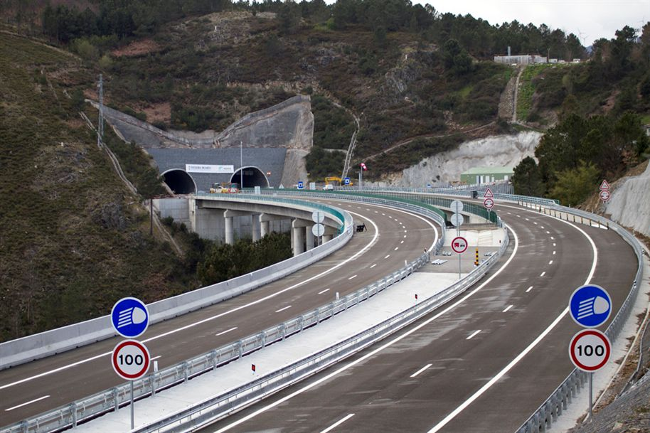 Acesso à entrada para o Túnel do Marão